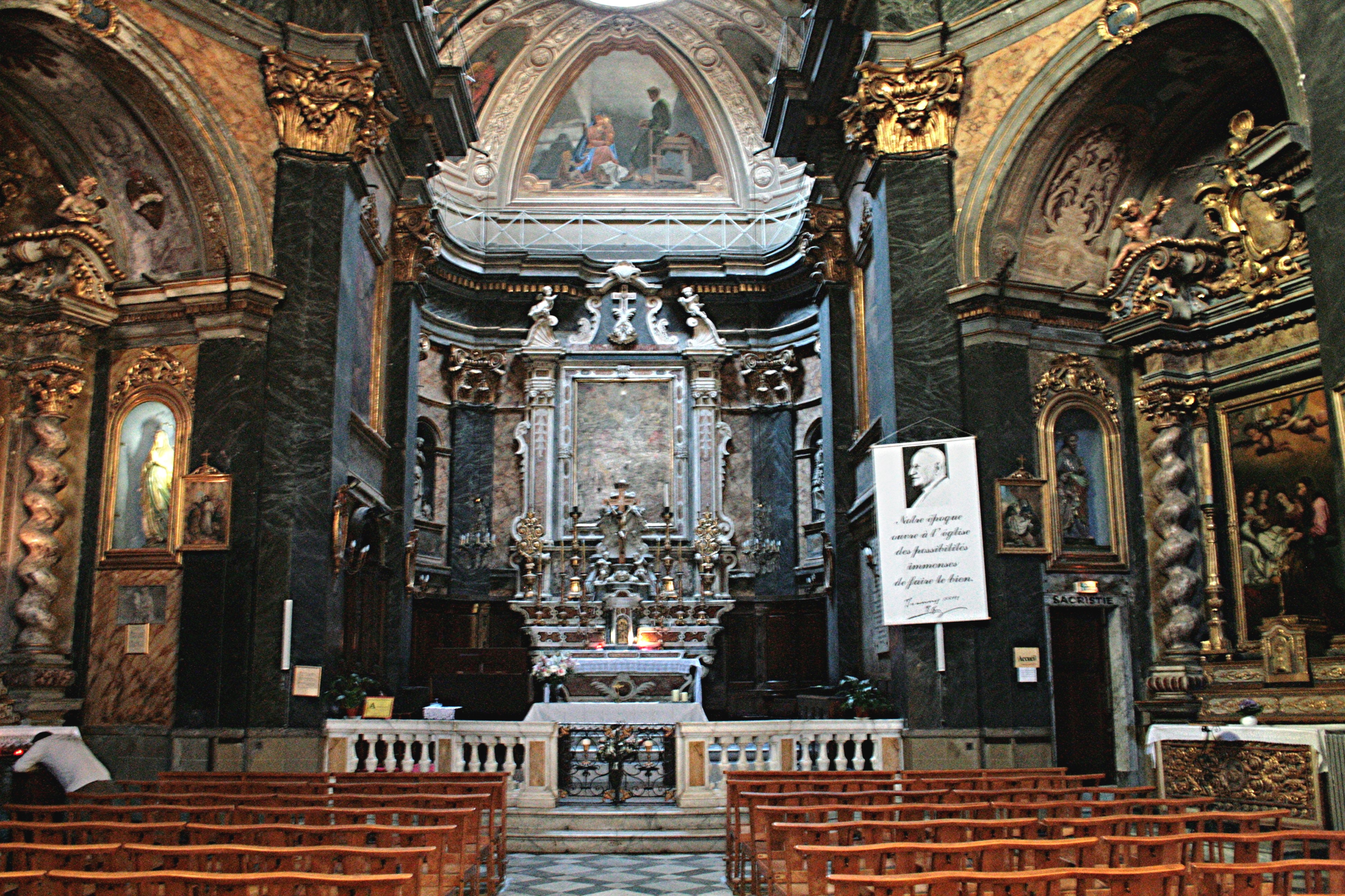 Chœur baroque de l'église Saint-Martin, Nice (Alpes-Maritimes)